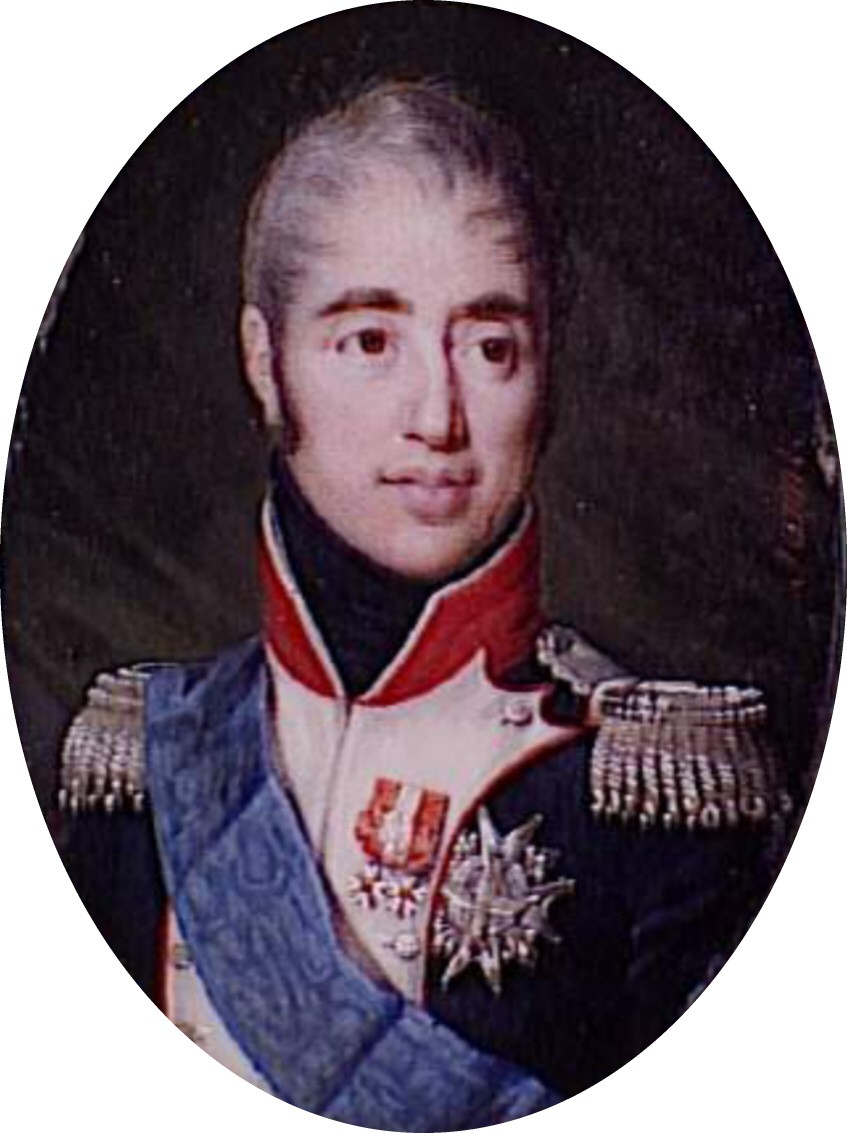 König Karl X. von Frankreich (1757-1836) in der Uniform eines Obersten der Nationalgarde